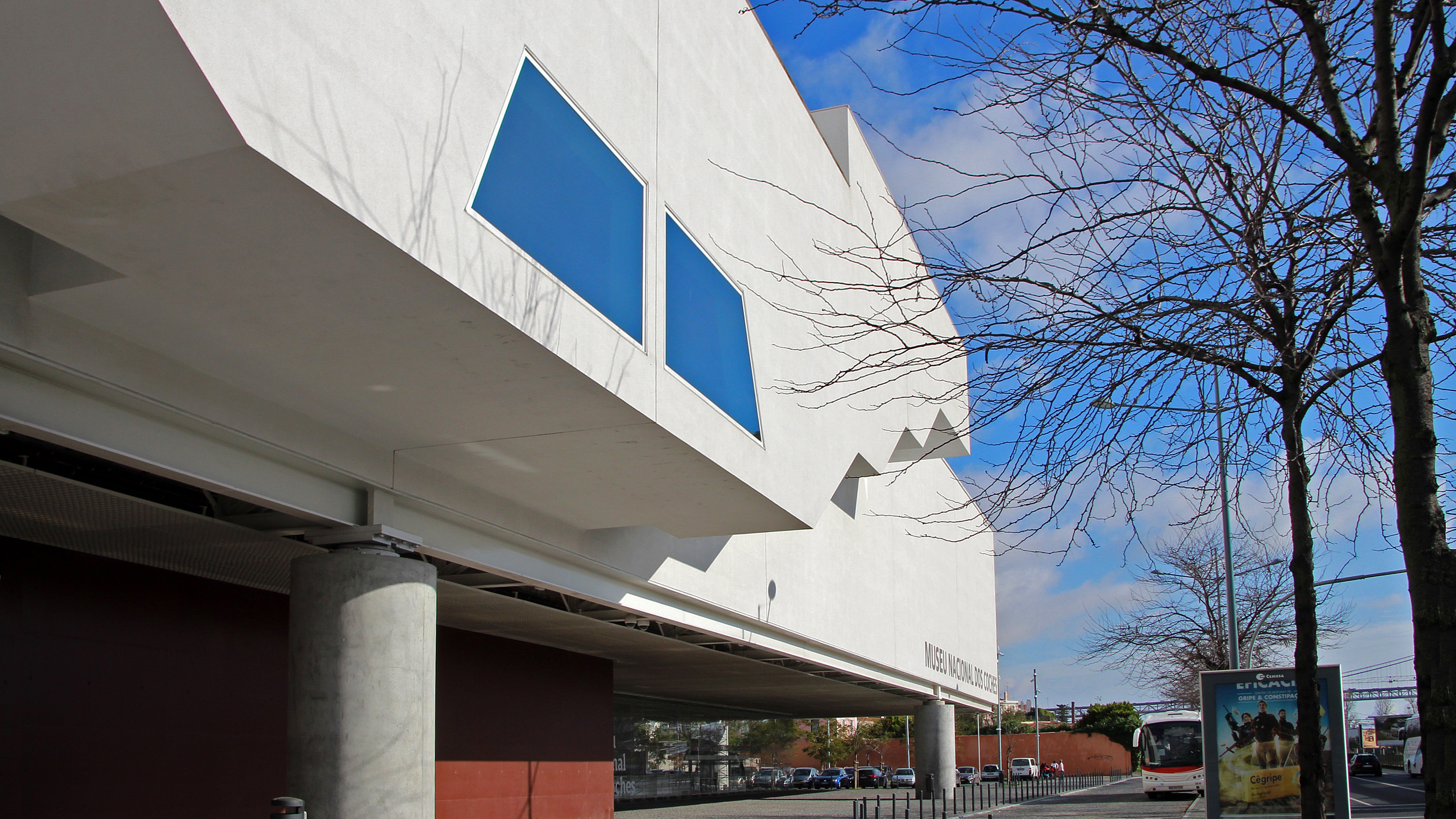 Der 2015 fertiggestellte Neubau des Kutschenmuseums in Belém (Lissabon)